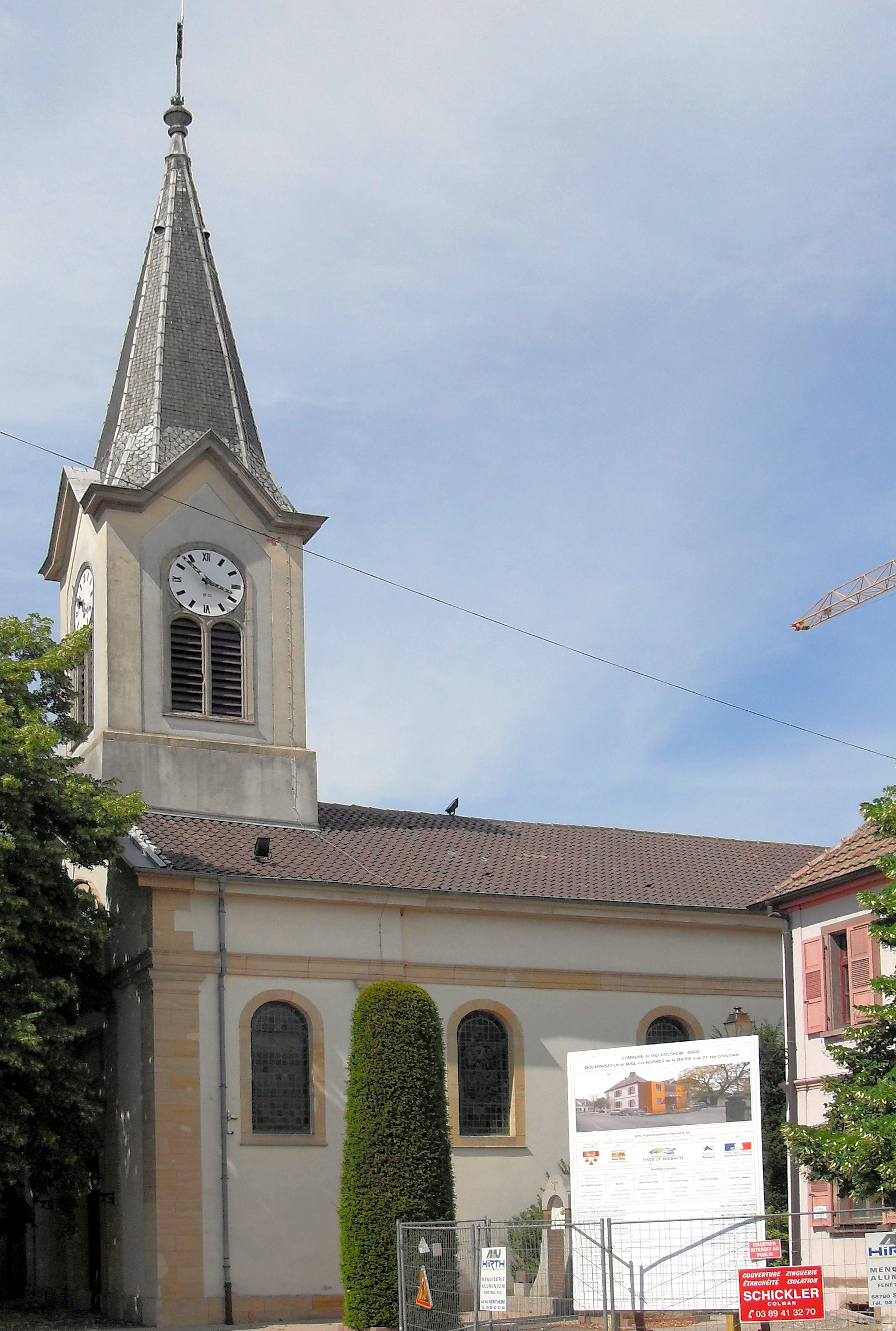 L'église Saint-Sébastien à Weckolsheim